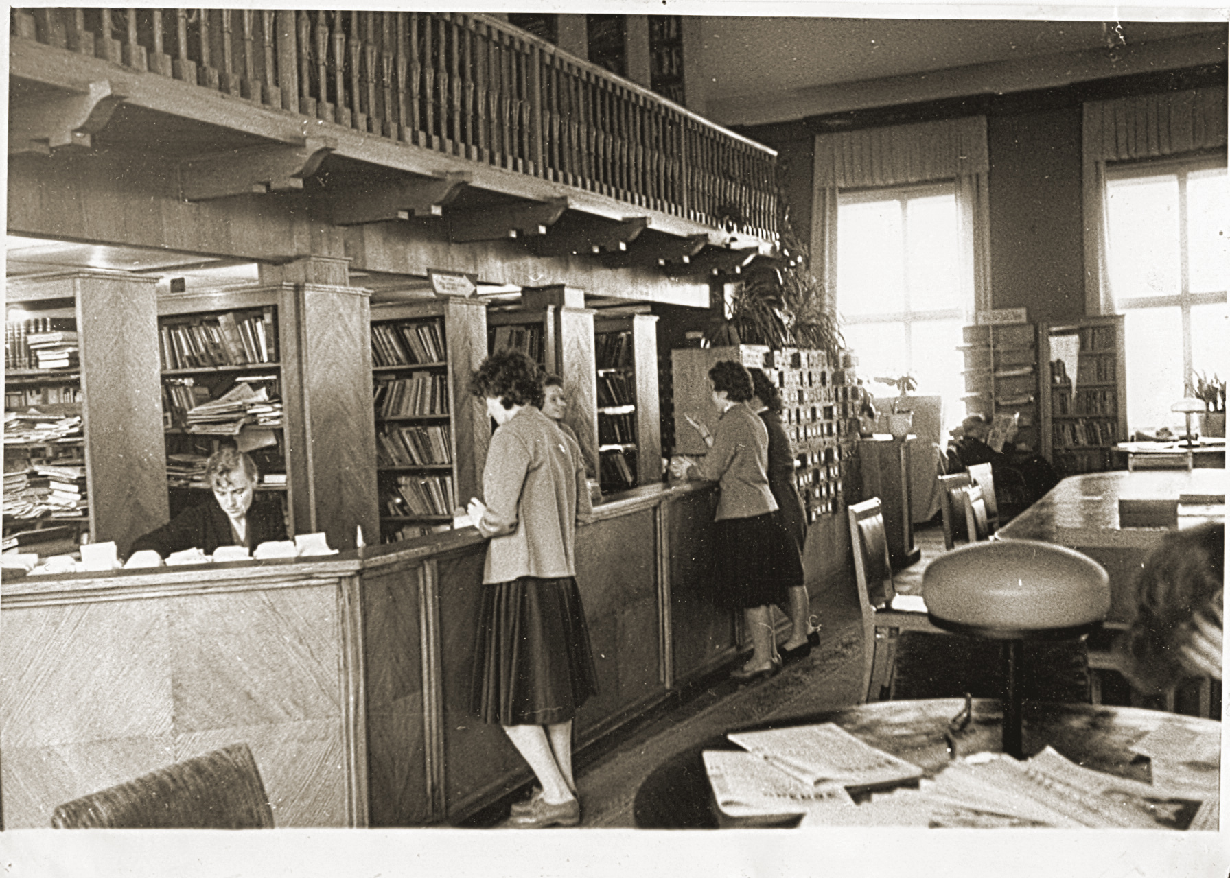 Черно-белая фотография